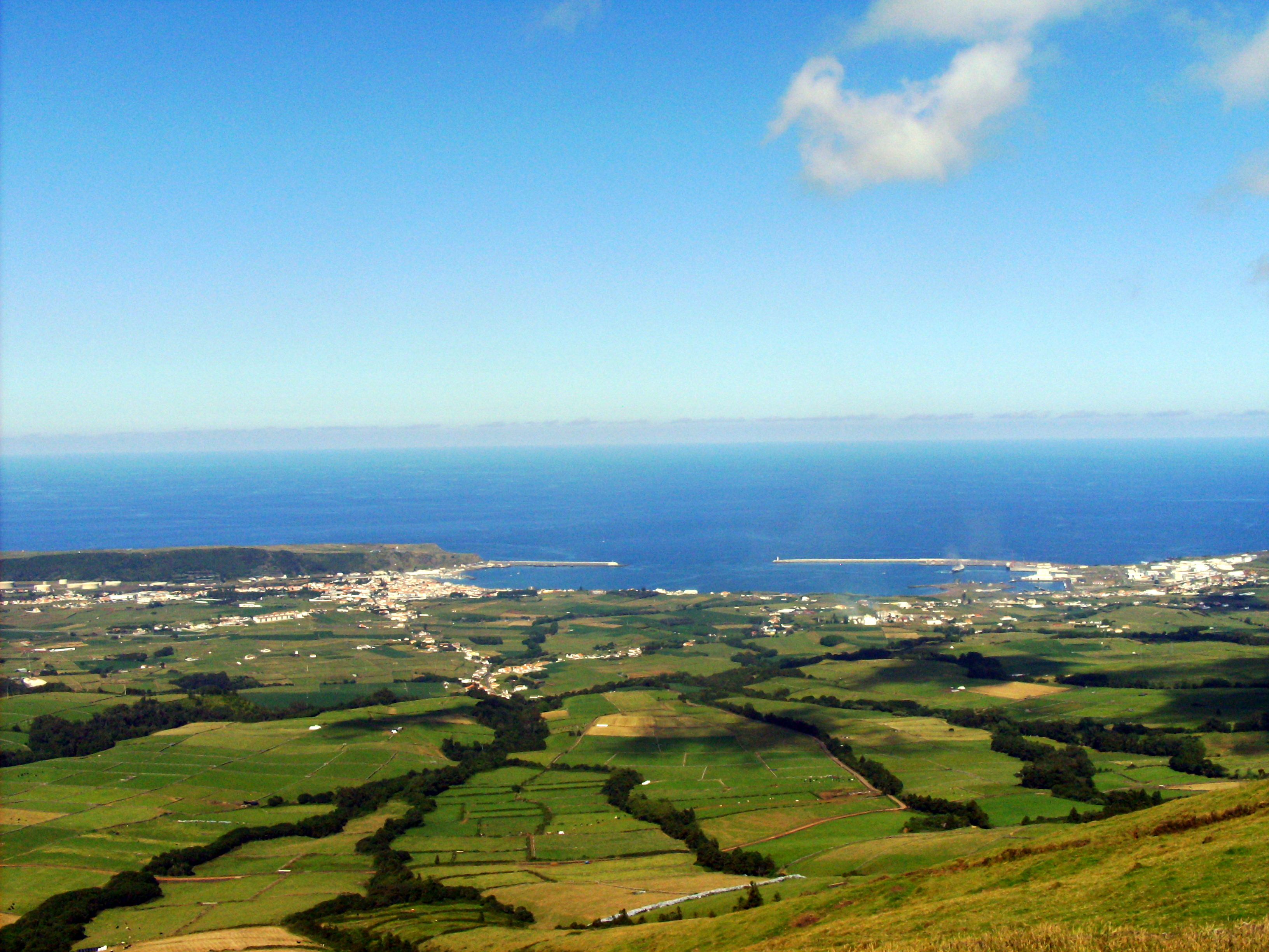 Encosta da serra do Cume: ao fundo a baía da Praia da Vitória, Ilha Terceira, Açores